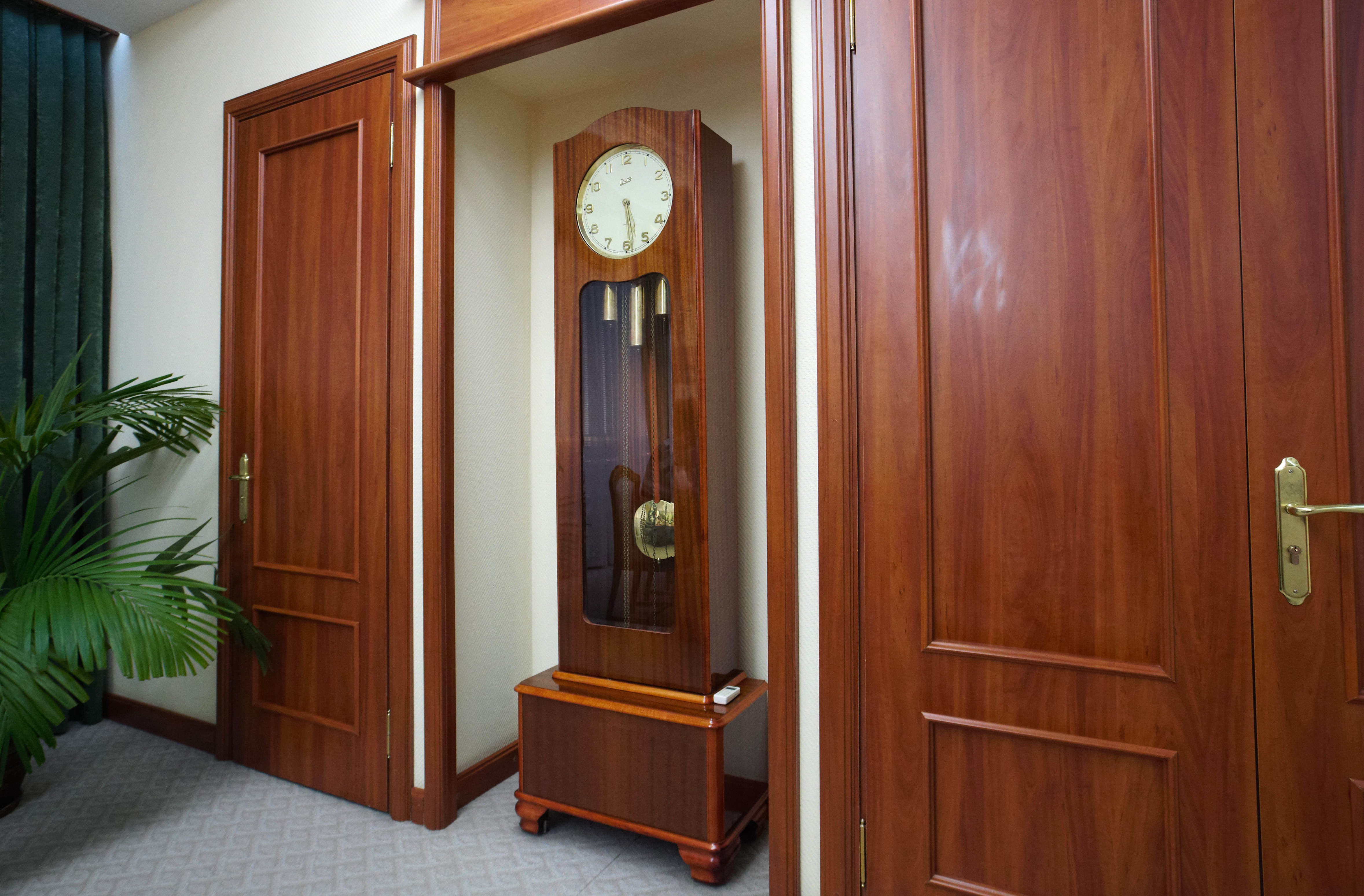 Часы ОЧЗ